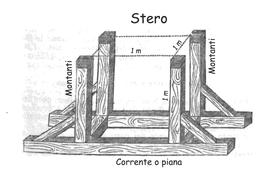 Strumento per misurare uno stero di legna da ardere. Fonte del disegno Sistema metrico teorico-pratico di Pietro Luigi Donini, G. Monti, 1853. Con scritte rifatte e aggiunta della misura